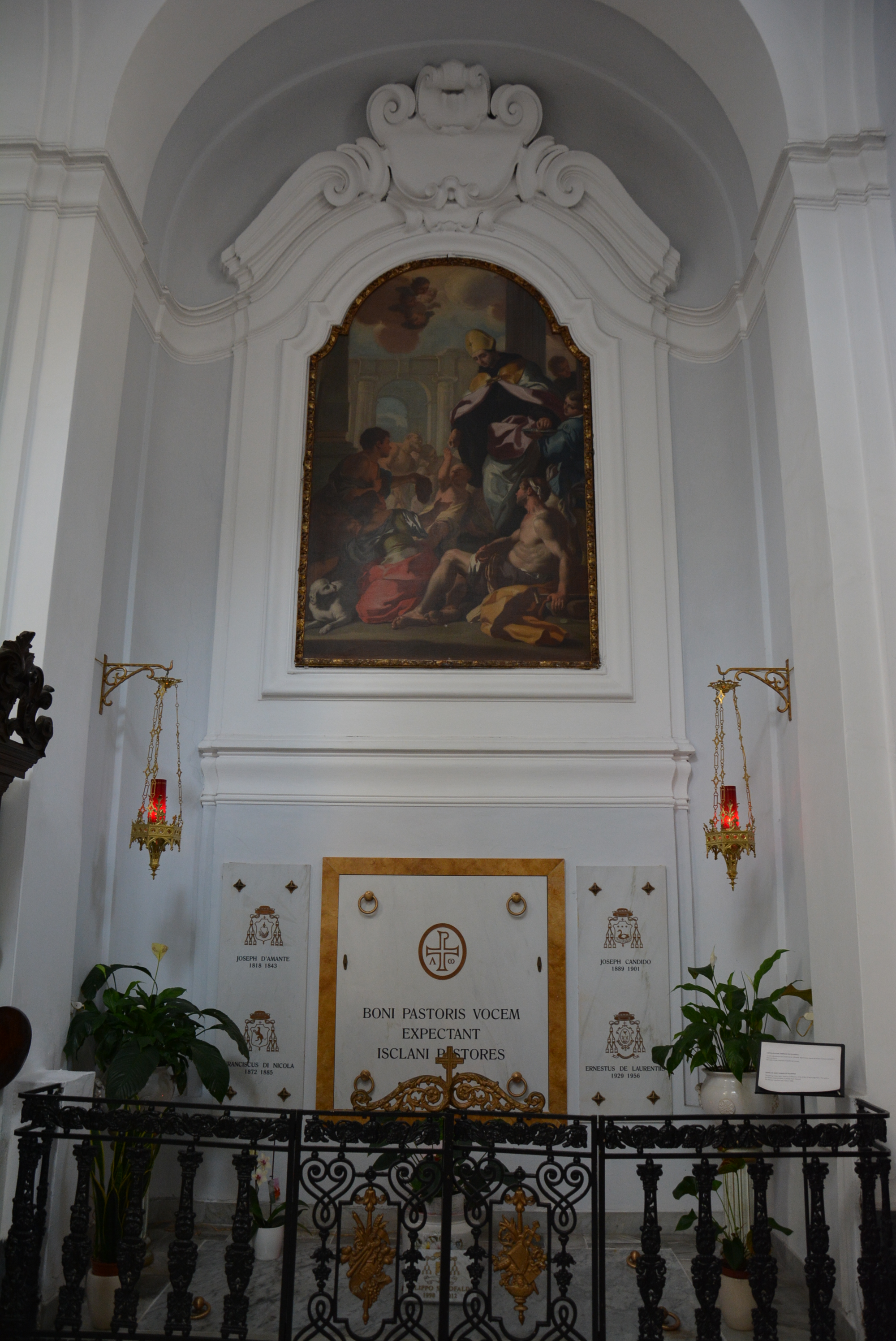 Cattedrale di Santa Maria Assunta a Ischia